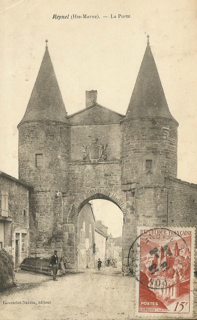 Carte postale de la porte